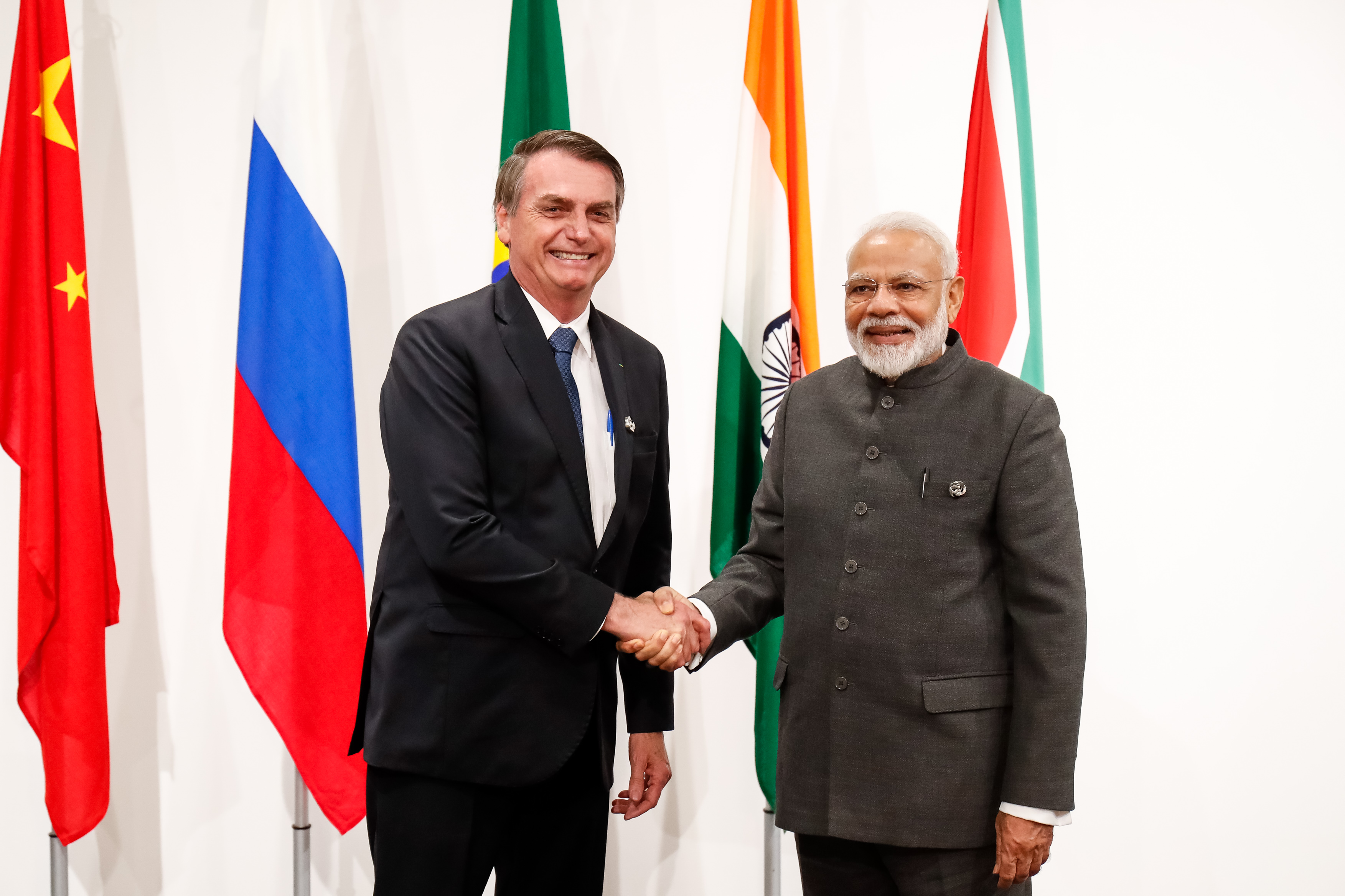 (Osaka - Japão, 28/06/2019) Presidente da República, Jair Bolsonaro, durante recepção ao Primeiro-Ministro da República da Índia, senhor Narenda Modi. Foto: Alan Santos/PR